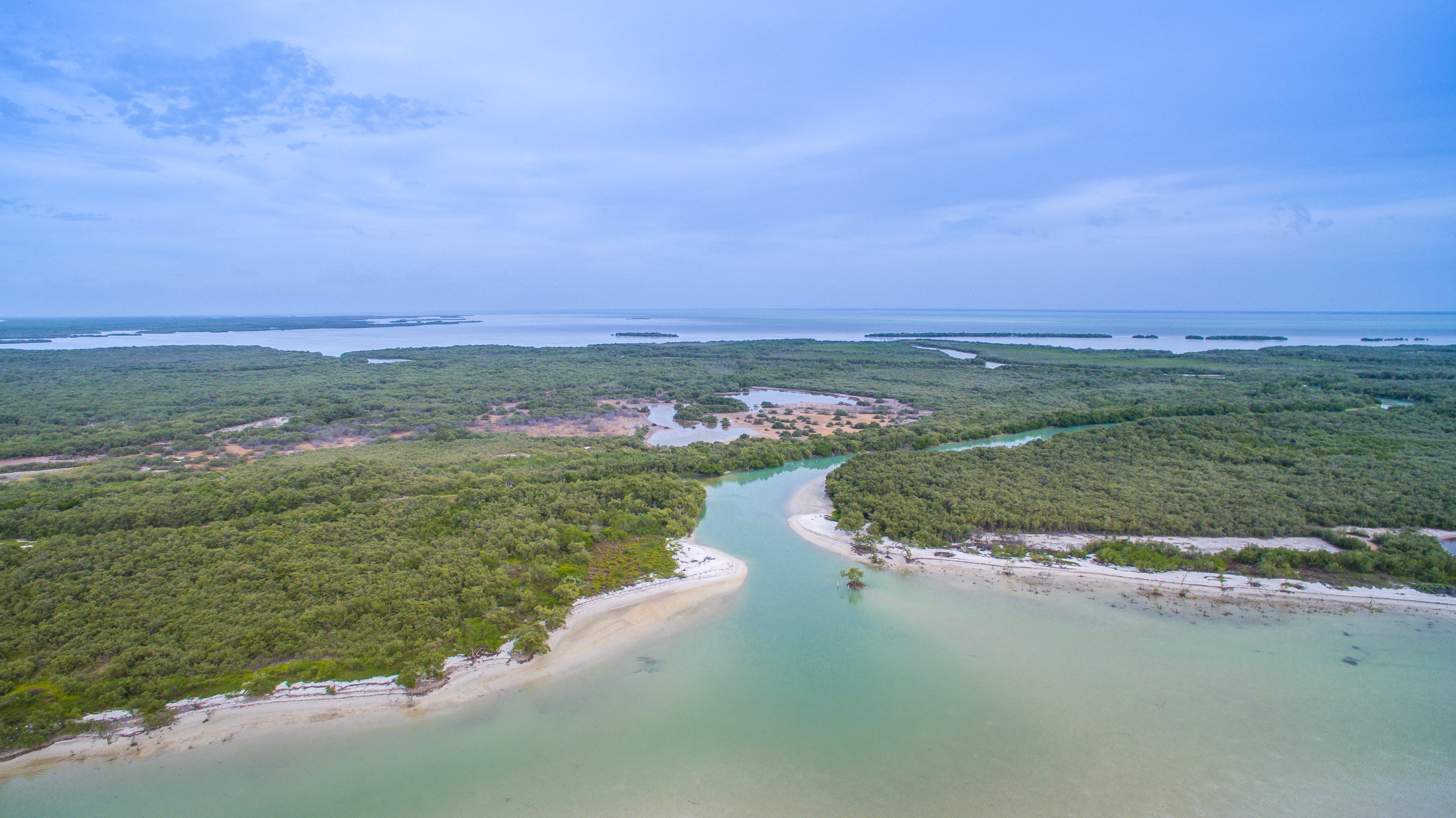 river delta Holbox Mexico arerial - Luftbild